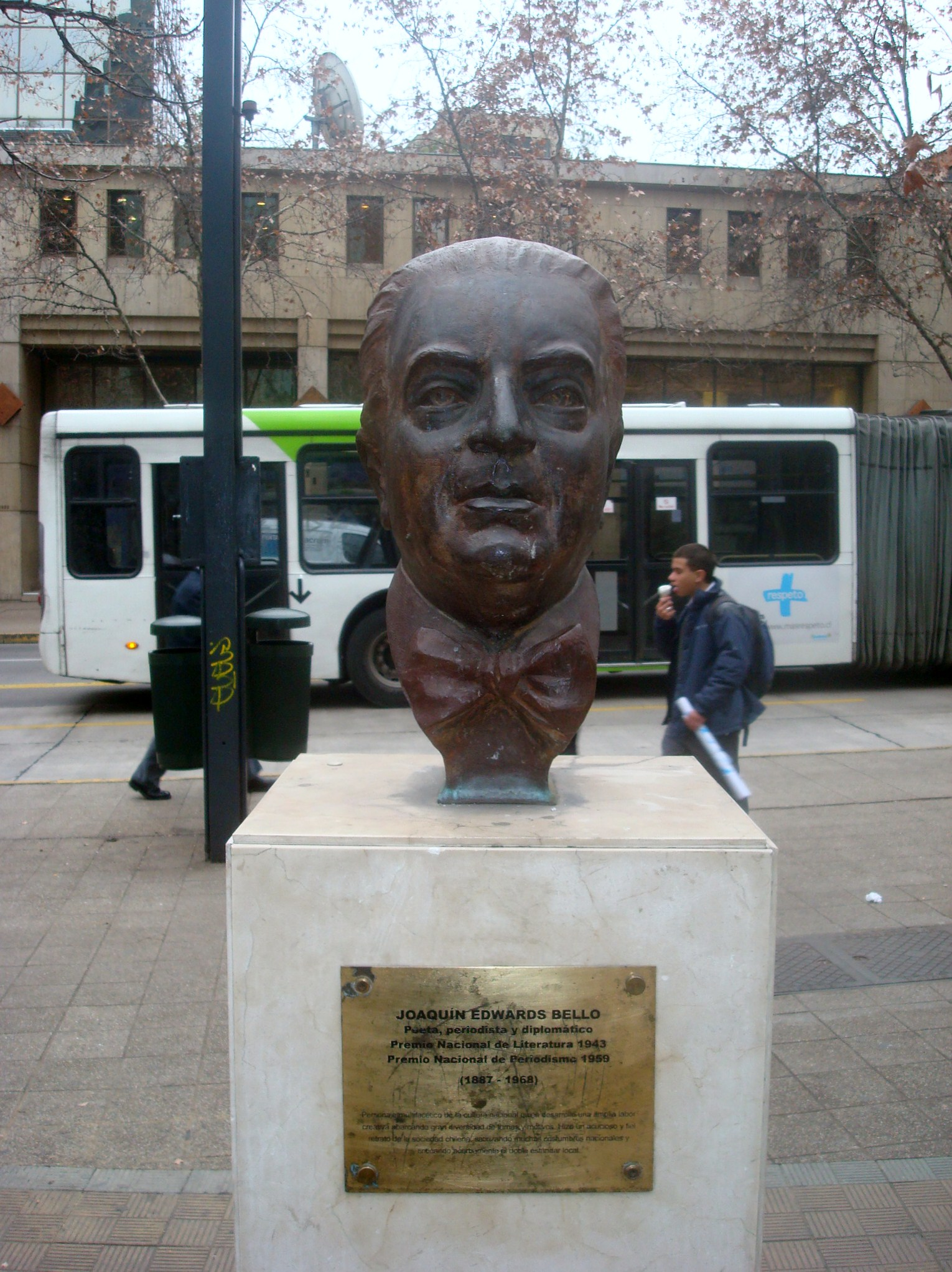 Busto de Joaquín Edwards Bello, Plaza Cardenal Samoré, Providencia, Santiago de Chile